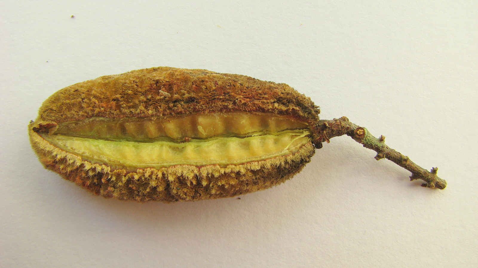 Trigonia nivea Cambess. var. pubescens (Cambess.) Lleras